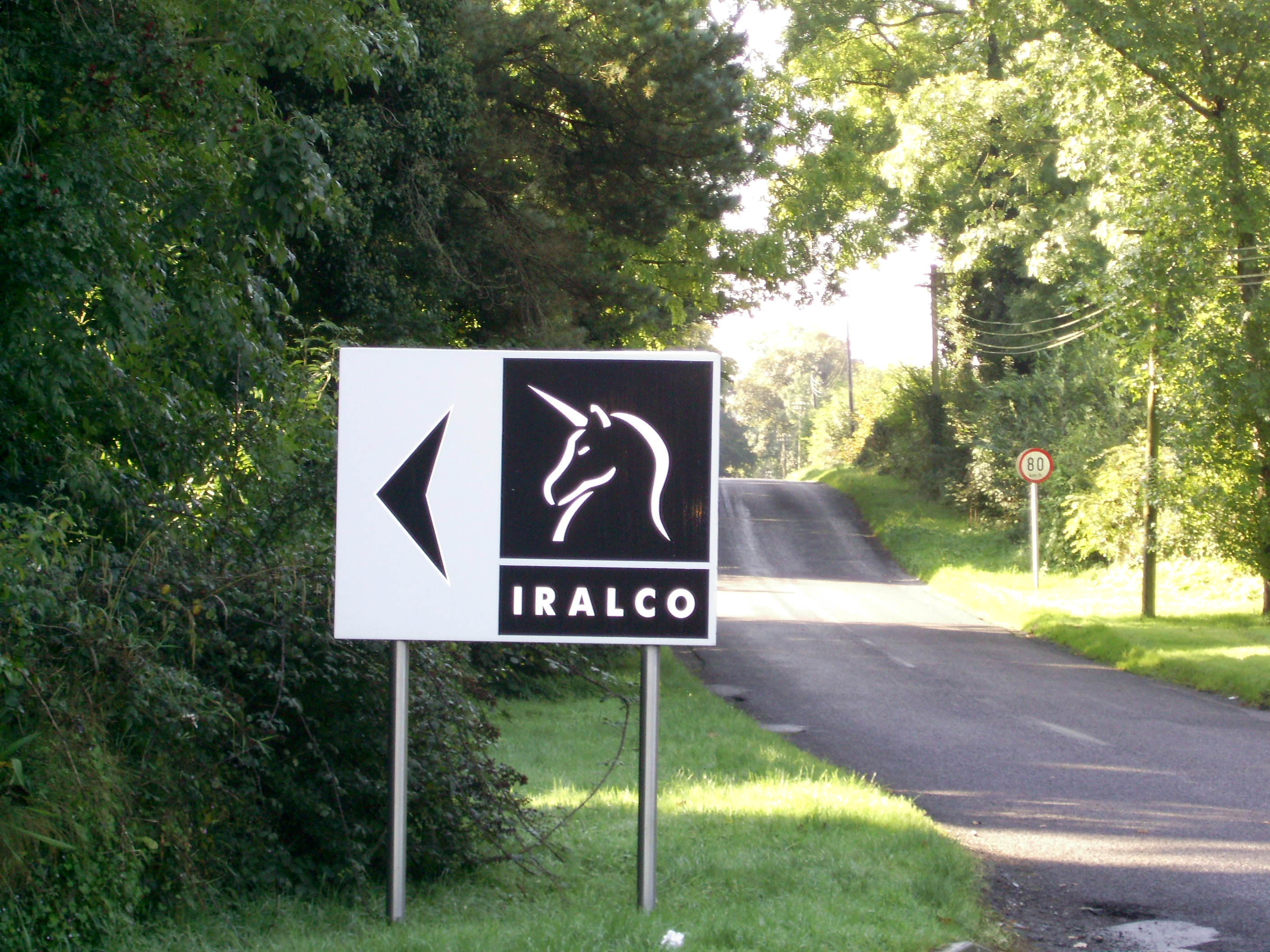 Paneau IRALCO